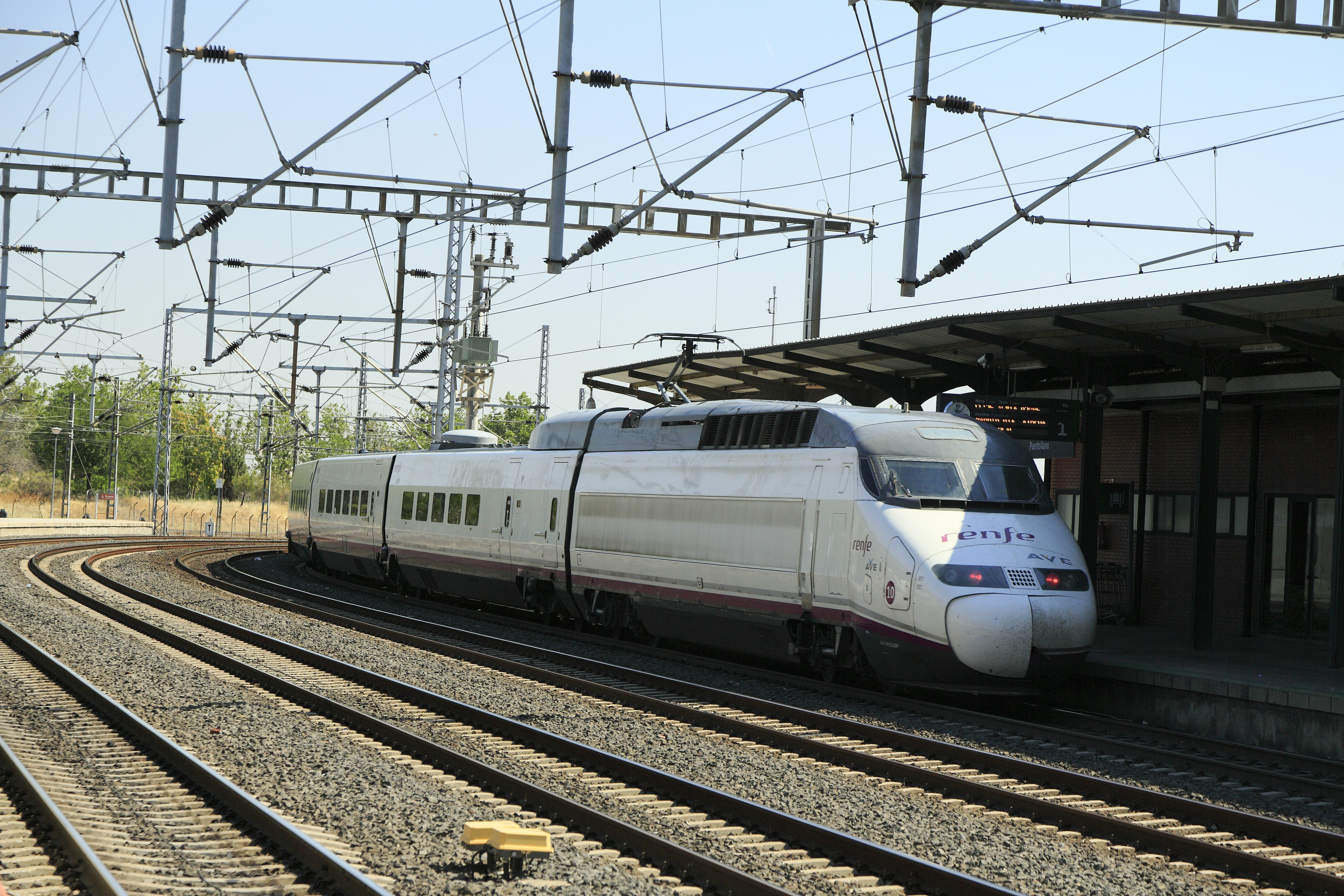 Hochgeschwindigkeitszug Madrid–Sevilla, Nachschuss bei der Ausfahrt.